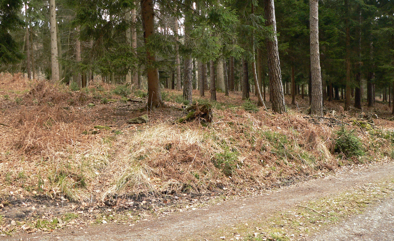 Schnippenburg - der von einem neuzeitlichen Waldweg durchschnittene Wall